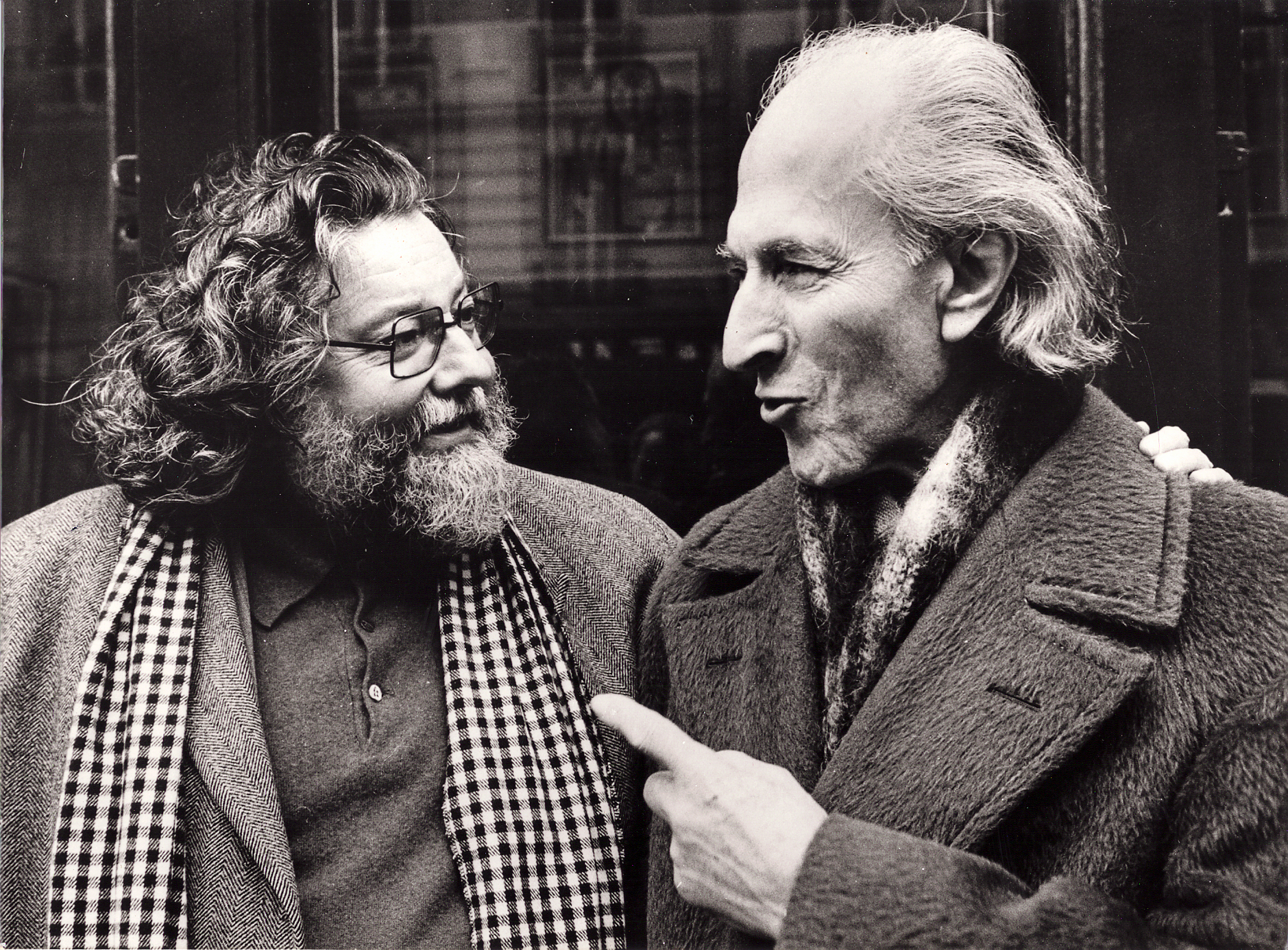 Mario Tozzi nel 1978 Parigi con Pierre Restany.